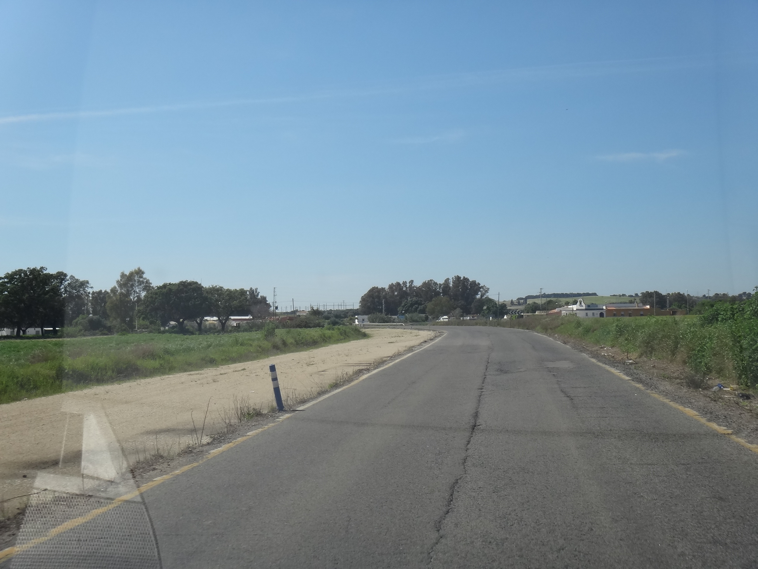 Barriada Rural La Guareña, Jerez de la Frontera (Andalucía, España)